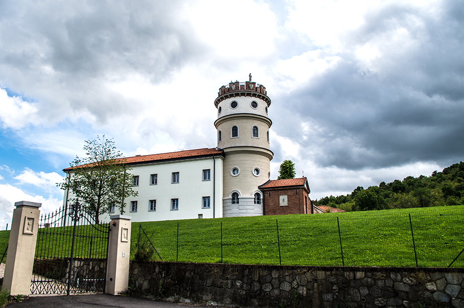 Eremo dei Camaldolesi (ristrutturato)